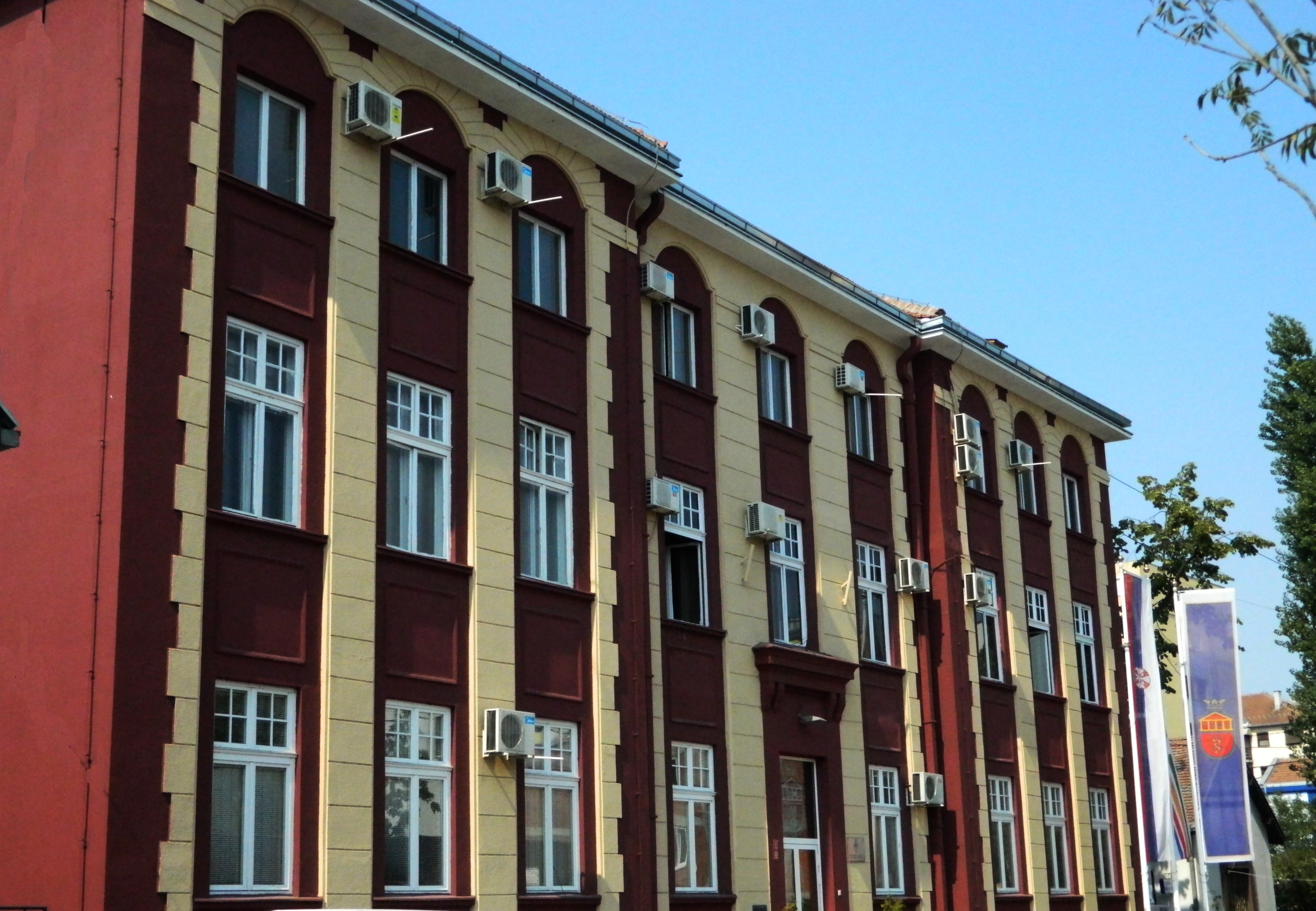 Ulica Svetozara Markovića 69, Kragujevac